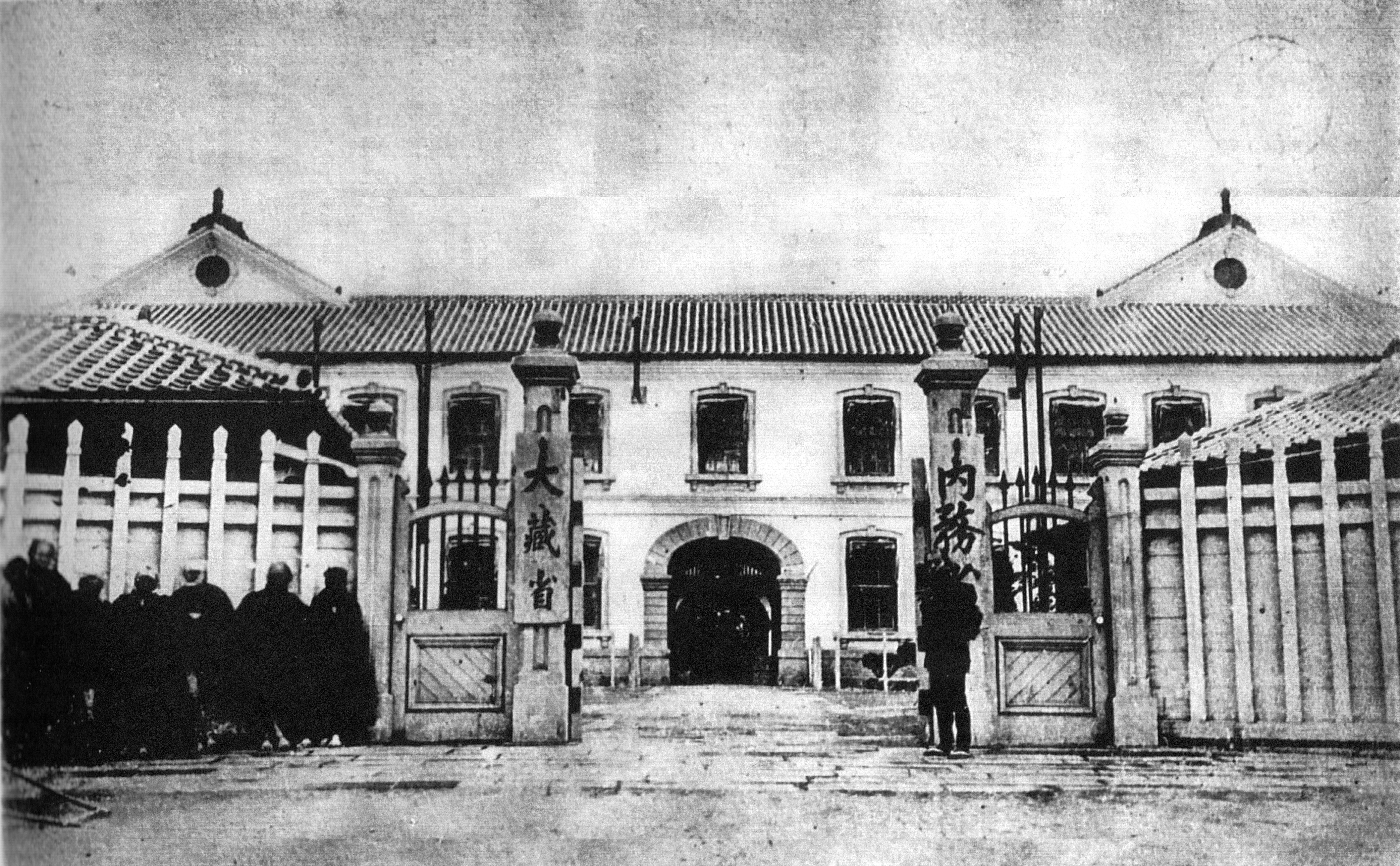 明治時代に建てられた林忠恕設計の大蔵省庁舎